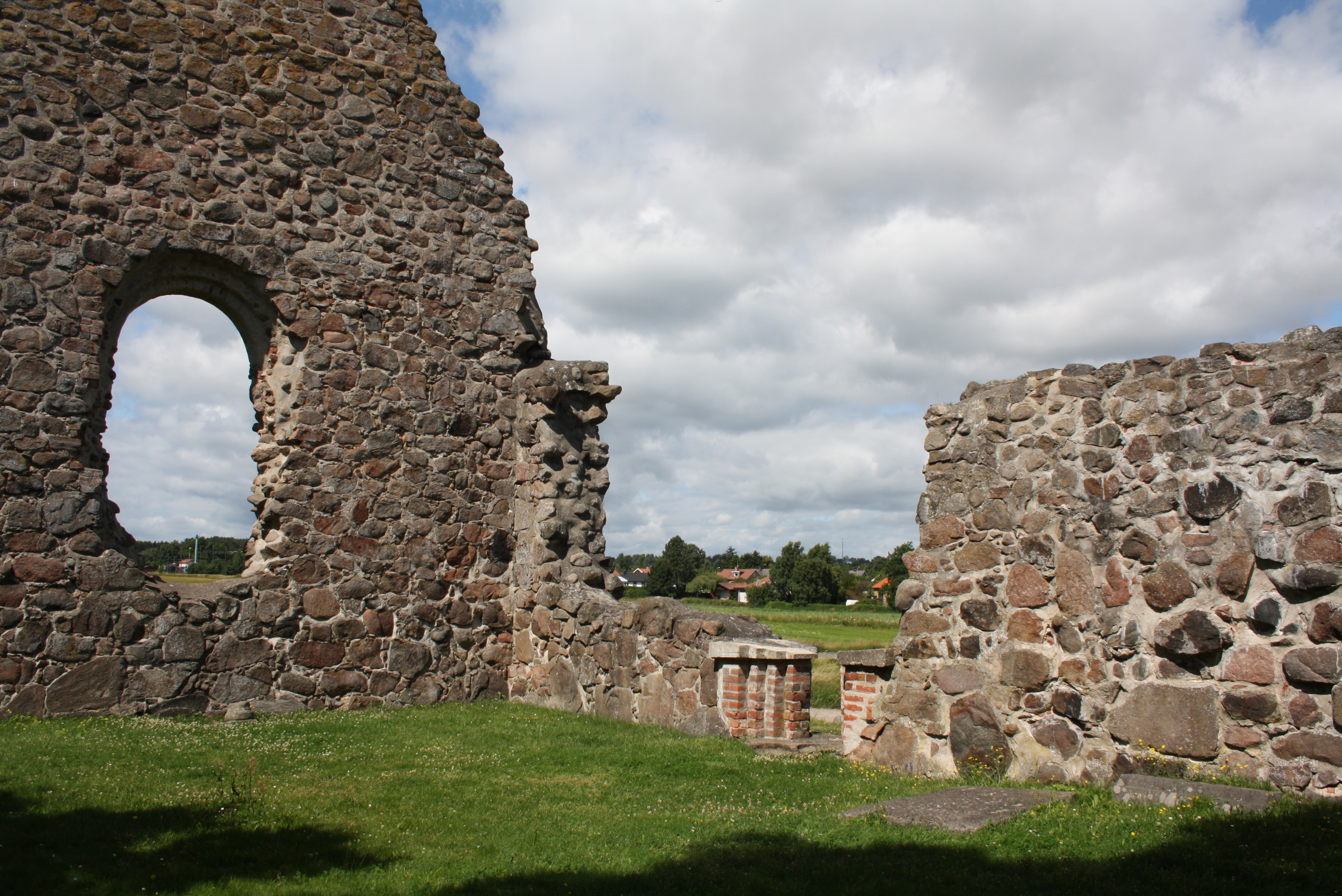 Sankt Gertruds kapell